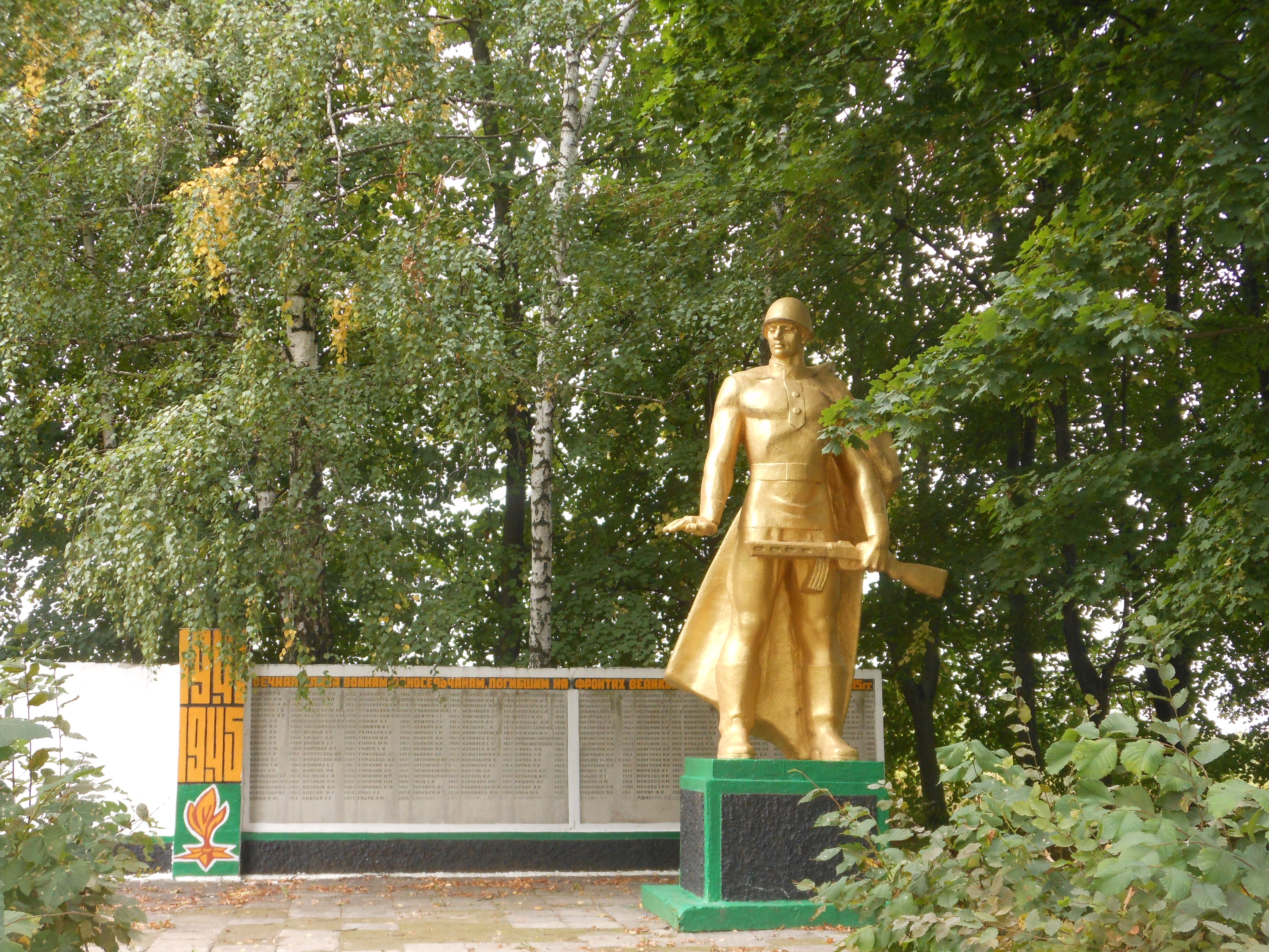 Пам’ятник 247 воїнам –односельчанам, загиблим на фронтах ВВВ, Чернятин, вул. Садова